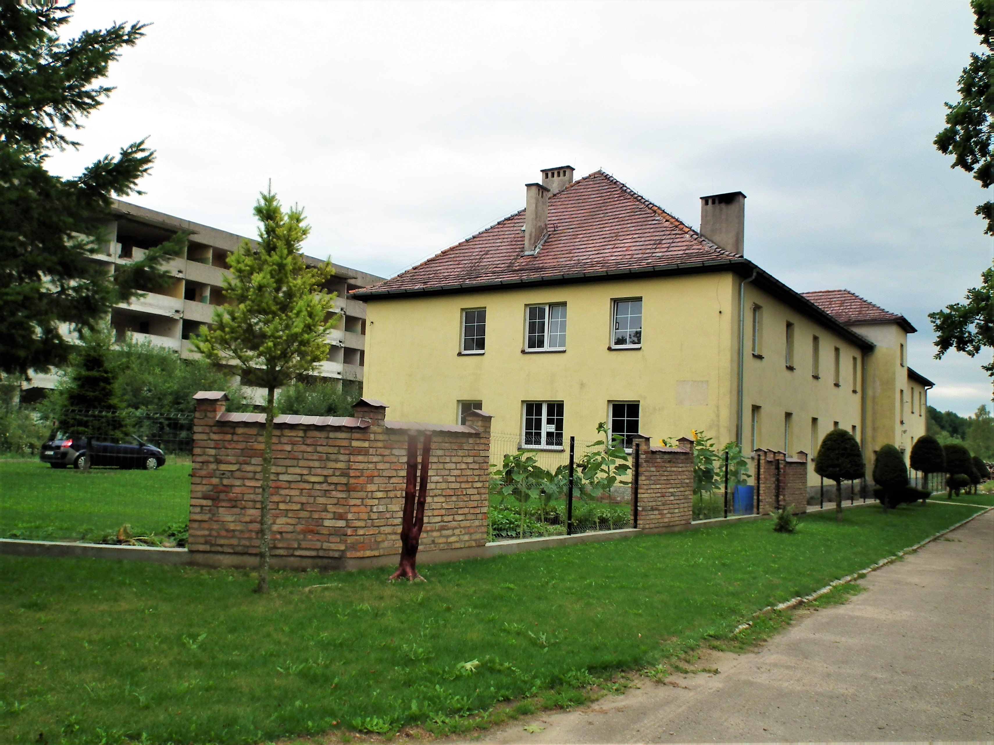 Zabudowania wsi Kłomino koło Bornego Sulinowa.